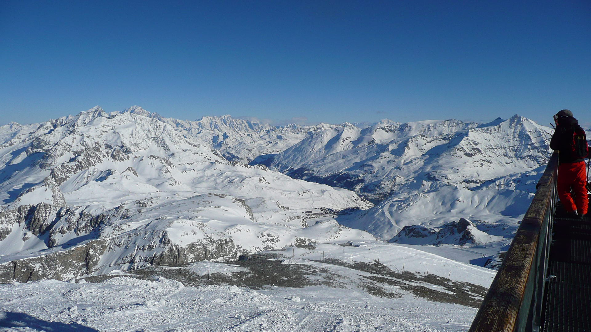 Vue de l'Espace Killy depuis le glacier de la Grande Motte à Tignes